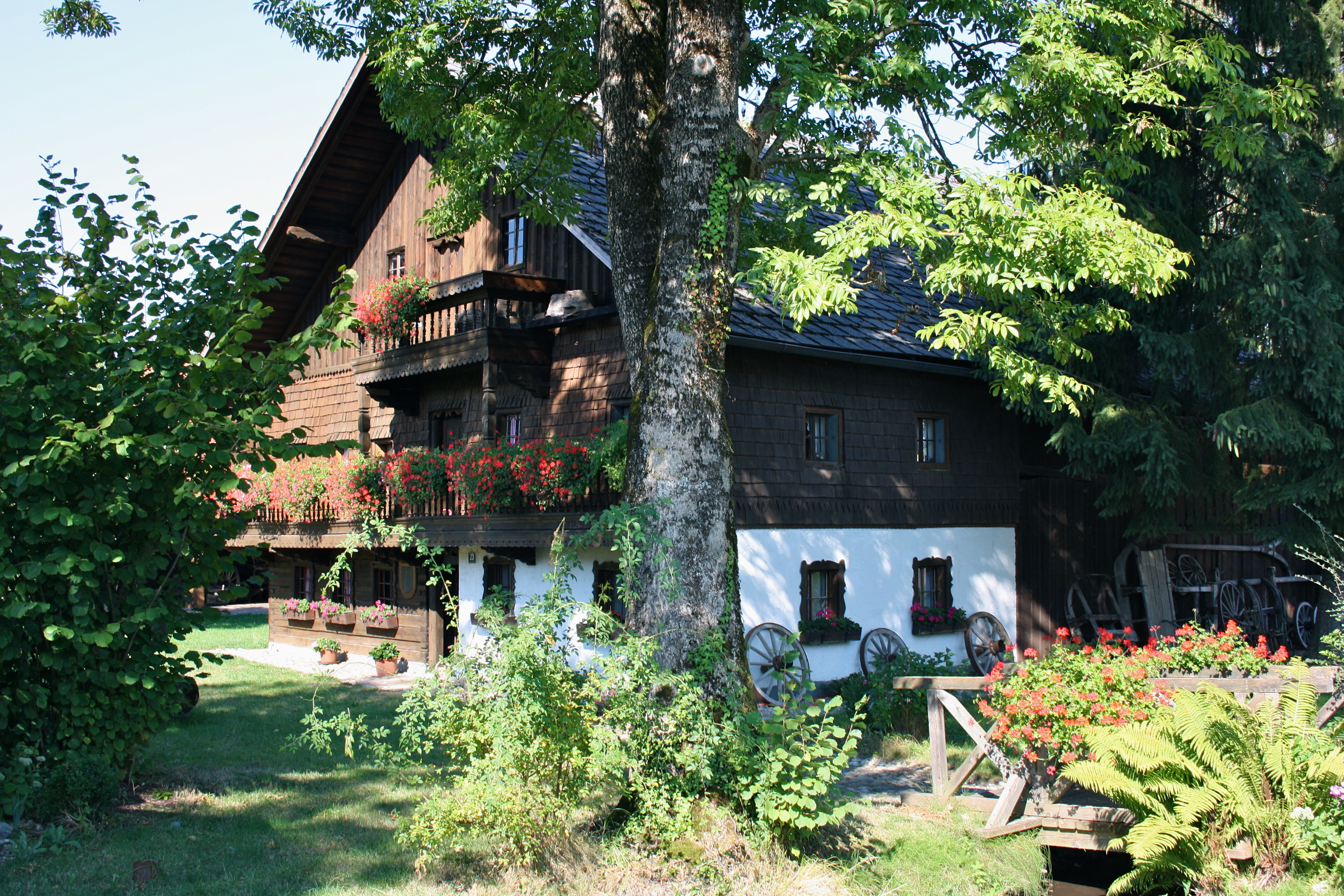 Heimathaus Schalchen, Oberösterreich. Object location48° 07′ 13.59″ N, 13° 09′ 37.7″ E